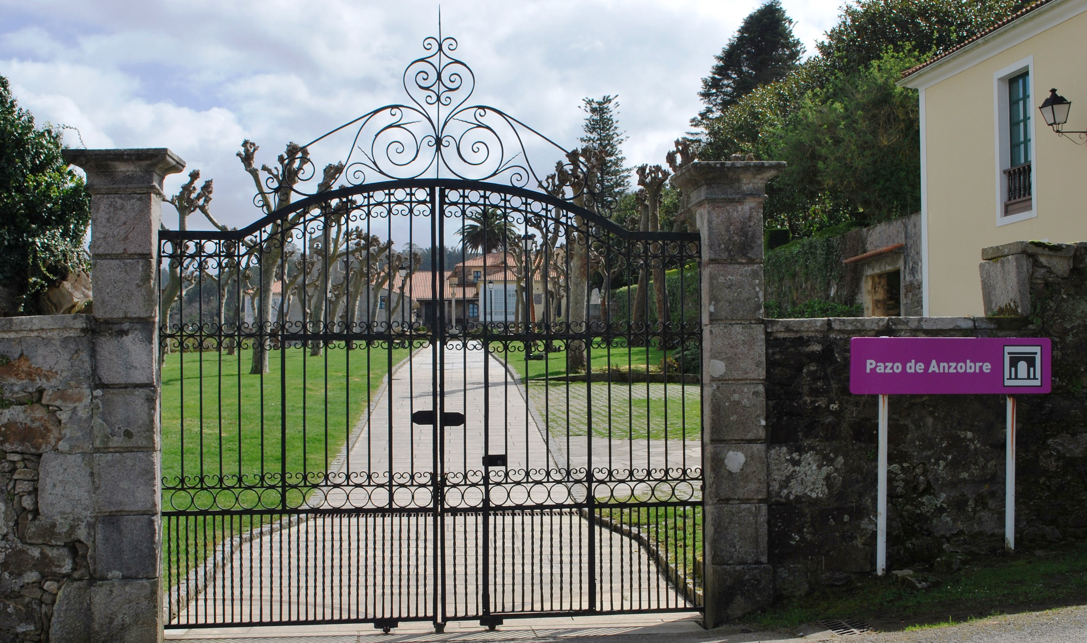 Acceso ao Pazo de Anzobre en Arteixo A Coruña Galiza Spain